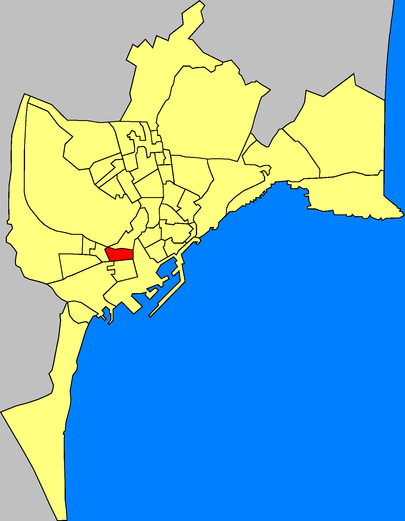 Barrios de la ciudad de Alicante